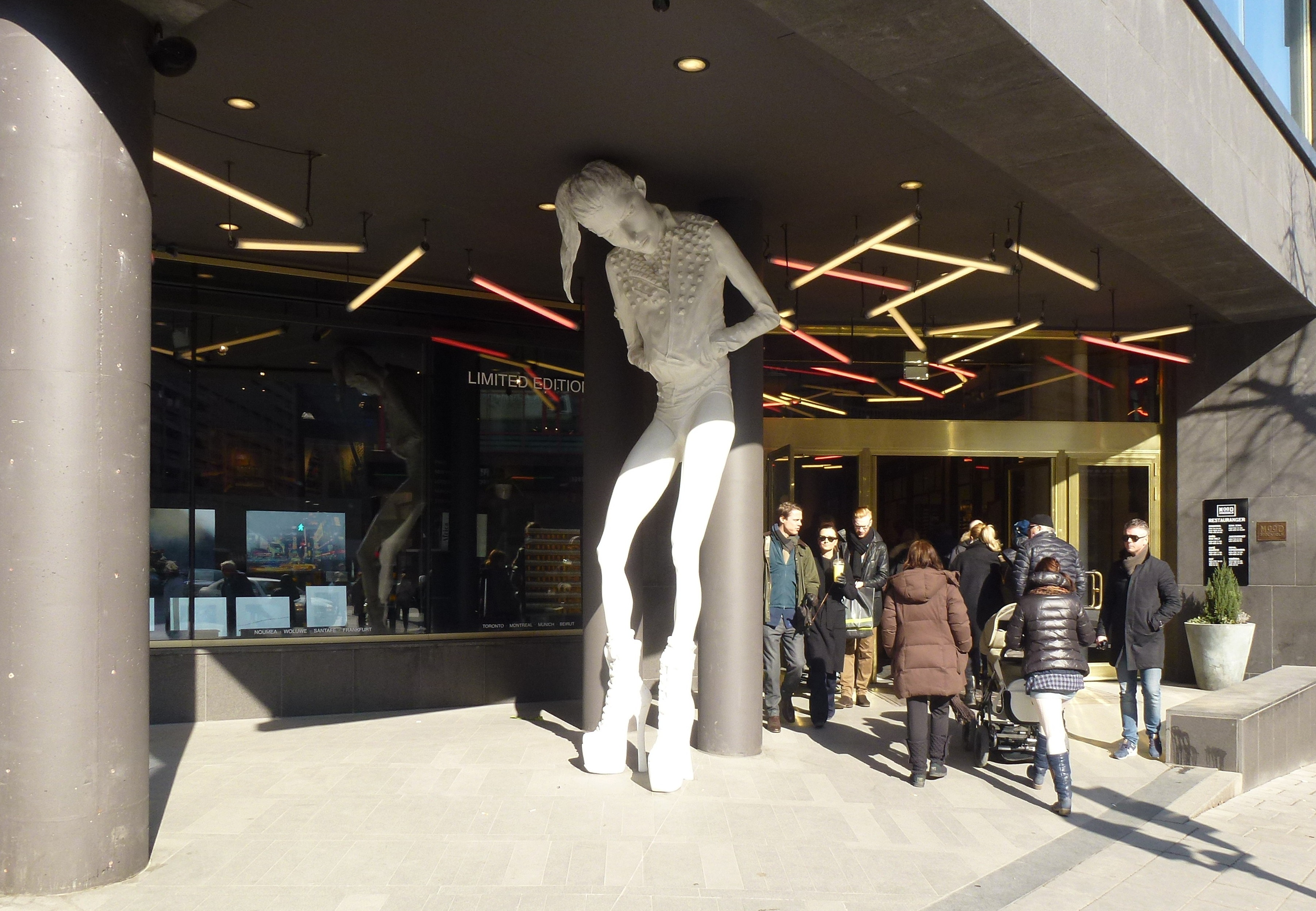 Mood Gallerian Stockholm och Cajsa von Zeipels skulptur Pretty Vacant